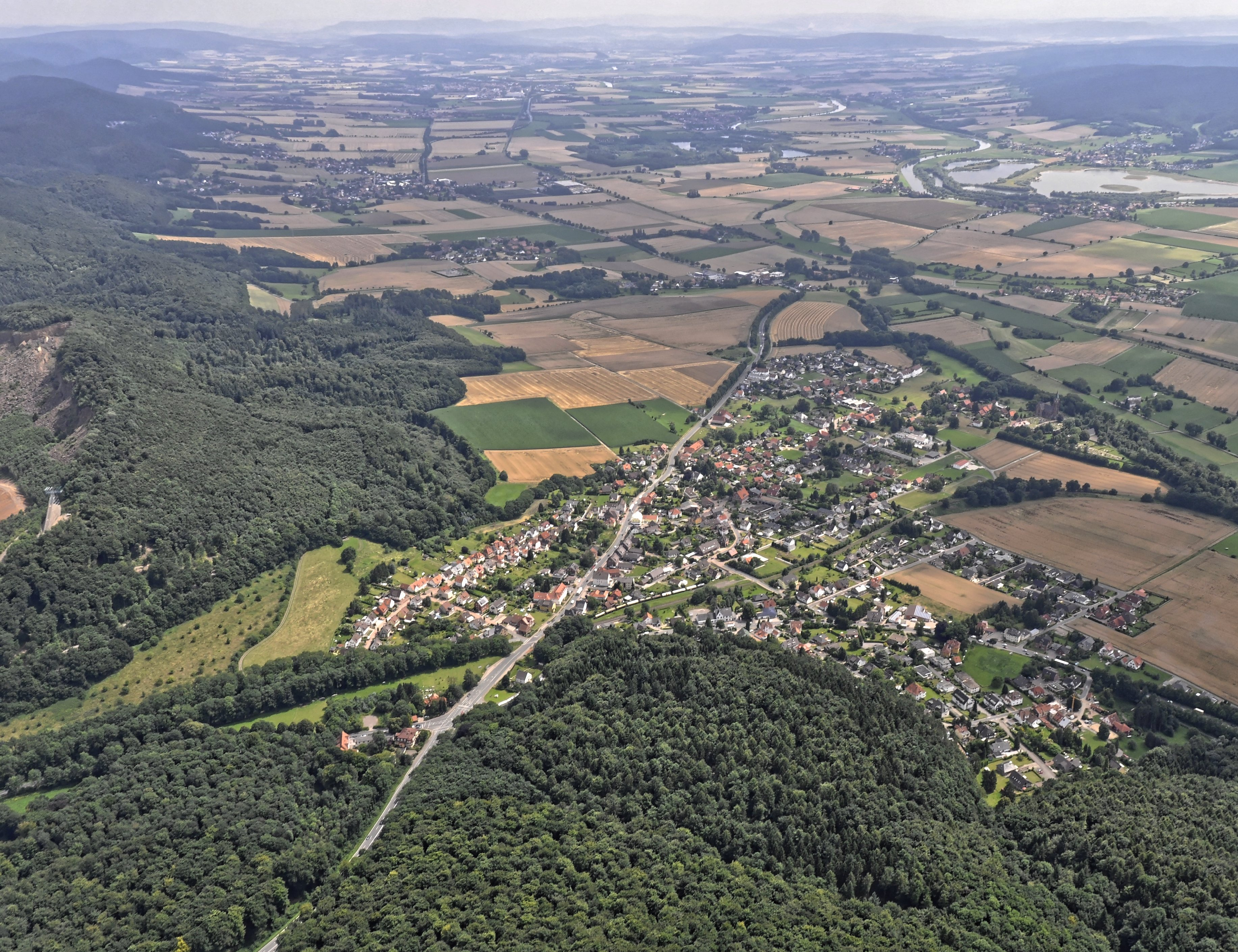 Bilder vom Flug Nordholz Hammelburg 2015